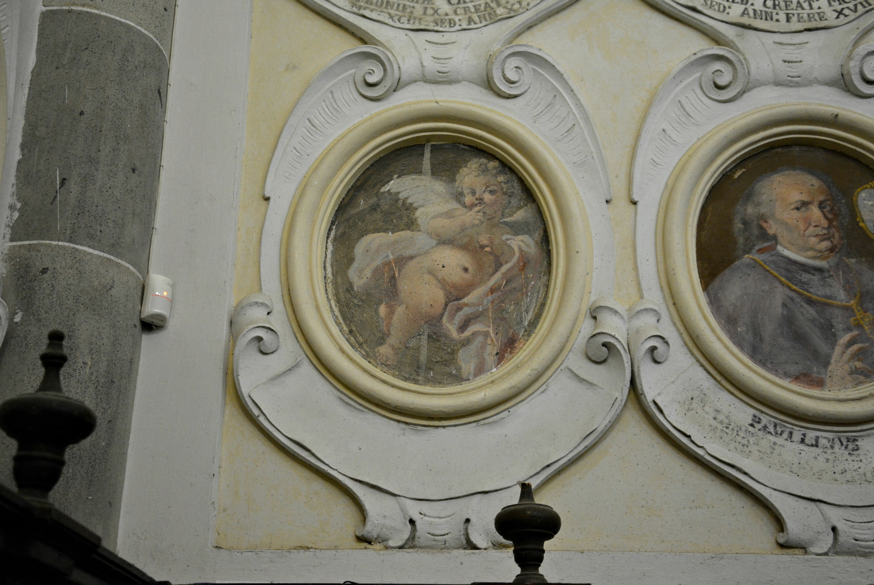 Vedi titolo